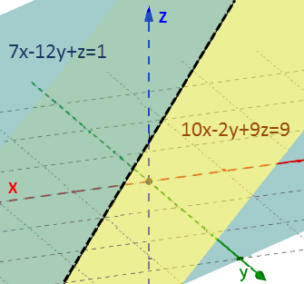 Права 3Д - пресек на 2 рамнини